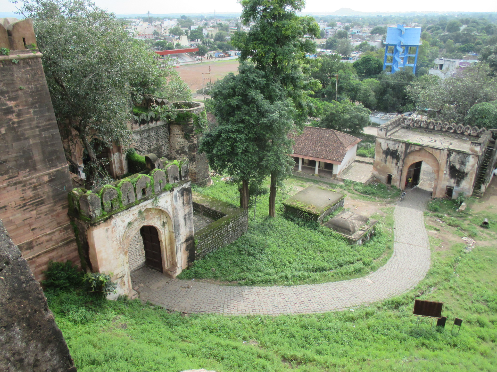 Dhar Fort, Dhar, Madhya Pradesh